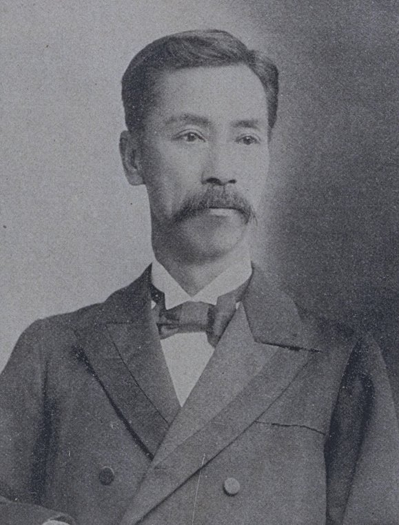 高橋新吉男爵（1843～1918）